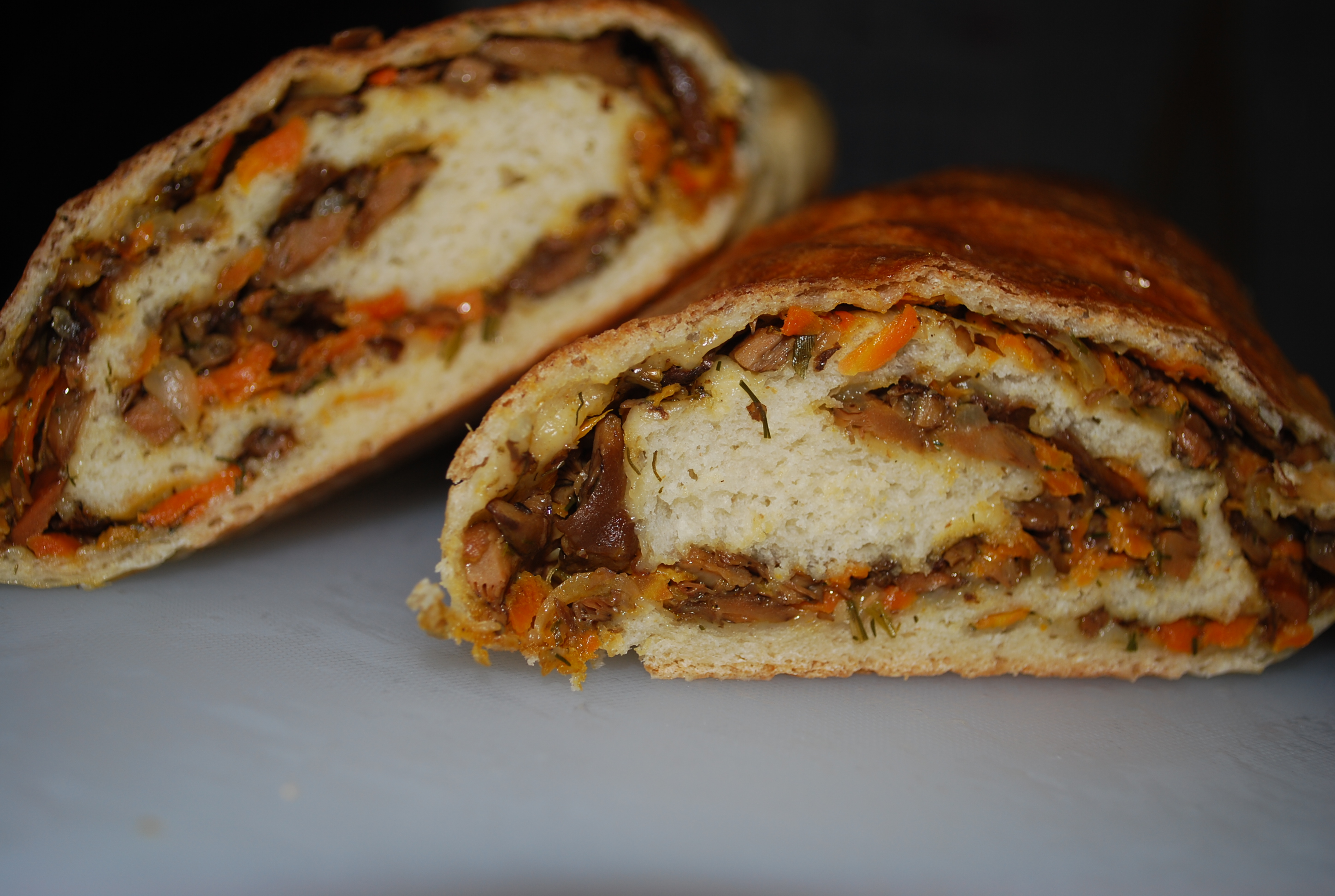 Pirukas